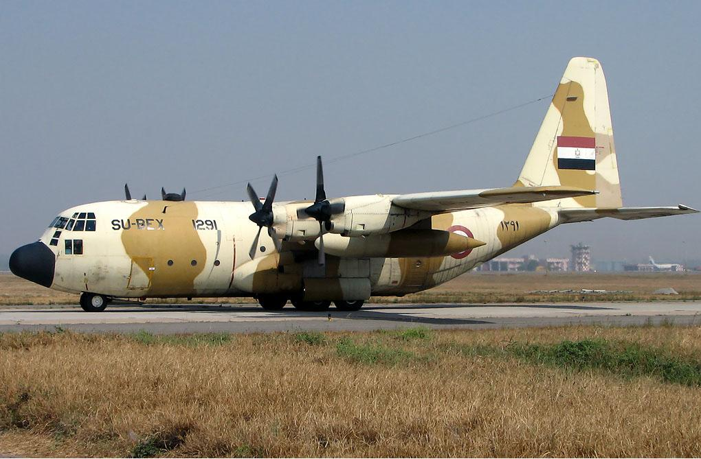 الطائرة المصرية سي - 130 هيركوليز . Lockheed_C-130H_Hercules , Egyptian Air Forces